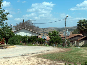 בתים טיפוסיים משנות ה-50 בhe:אמציה (יישוב)